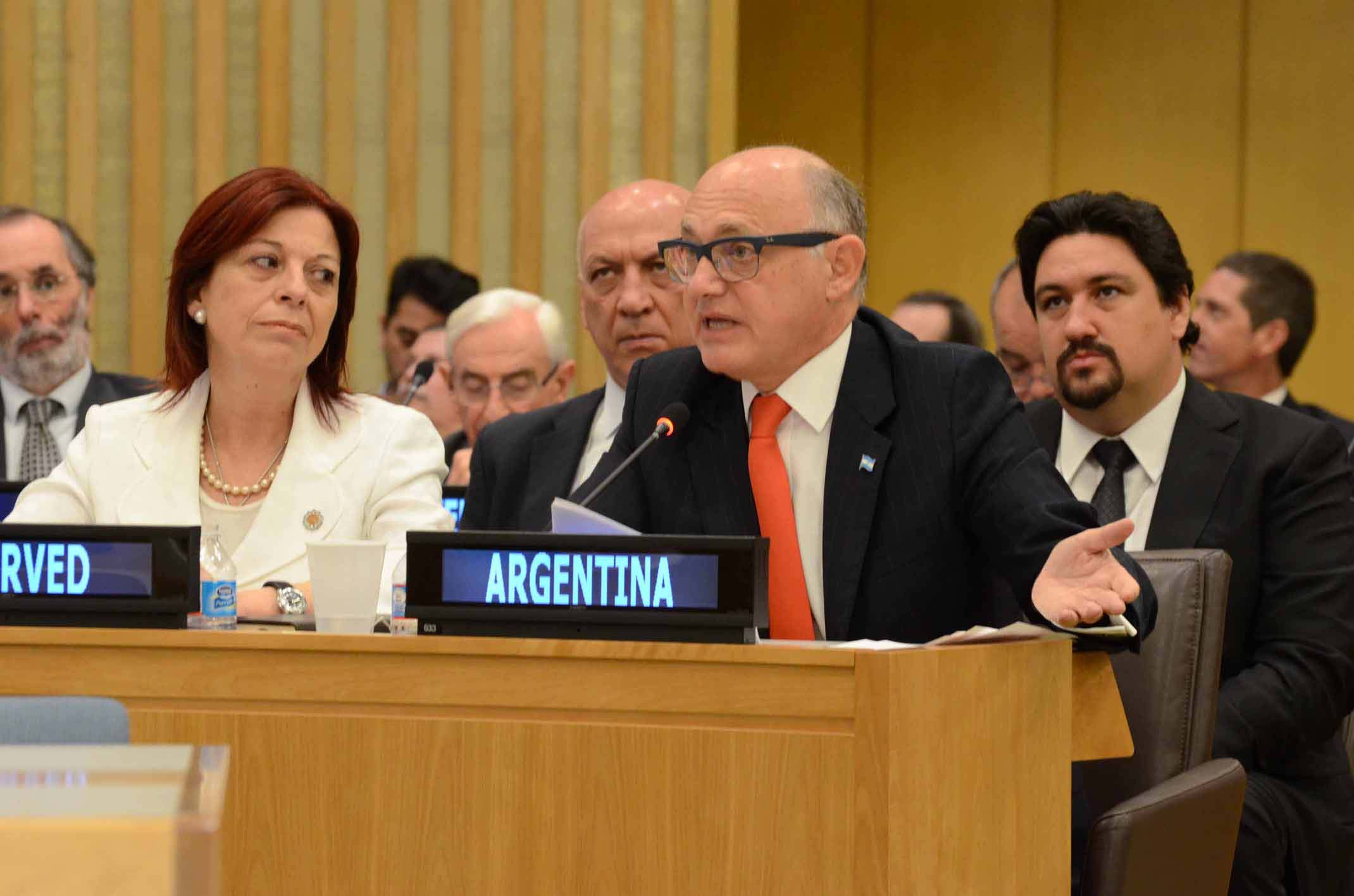 Nueva York. El Canciller Héctor Timerman expuso hoy en el Comité de Descolonización de la ONU la posición argentina que ratifica la plena disposición de nuestro país para encontrar una solución pacífica a la disputa de soberanía en la Cuestión Malvinas. A la izq. del Canciller la representante argentina ante la ONU, María Cristina Perceval.